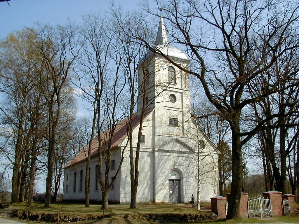 Madona, Lazdonas luterāņu baznīca 2000-04-21